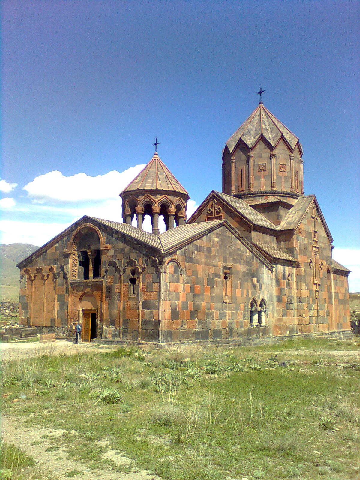 Վանական համալիր Հովհաննավաք, 4-13-րդ դարեր 112/17